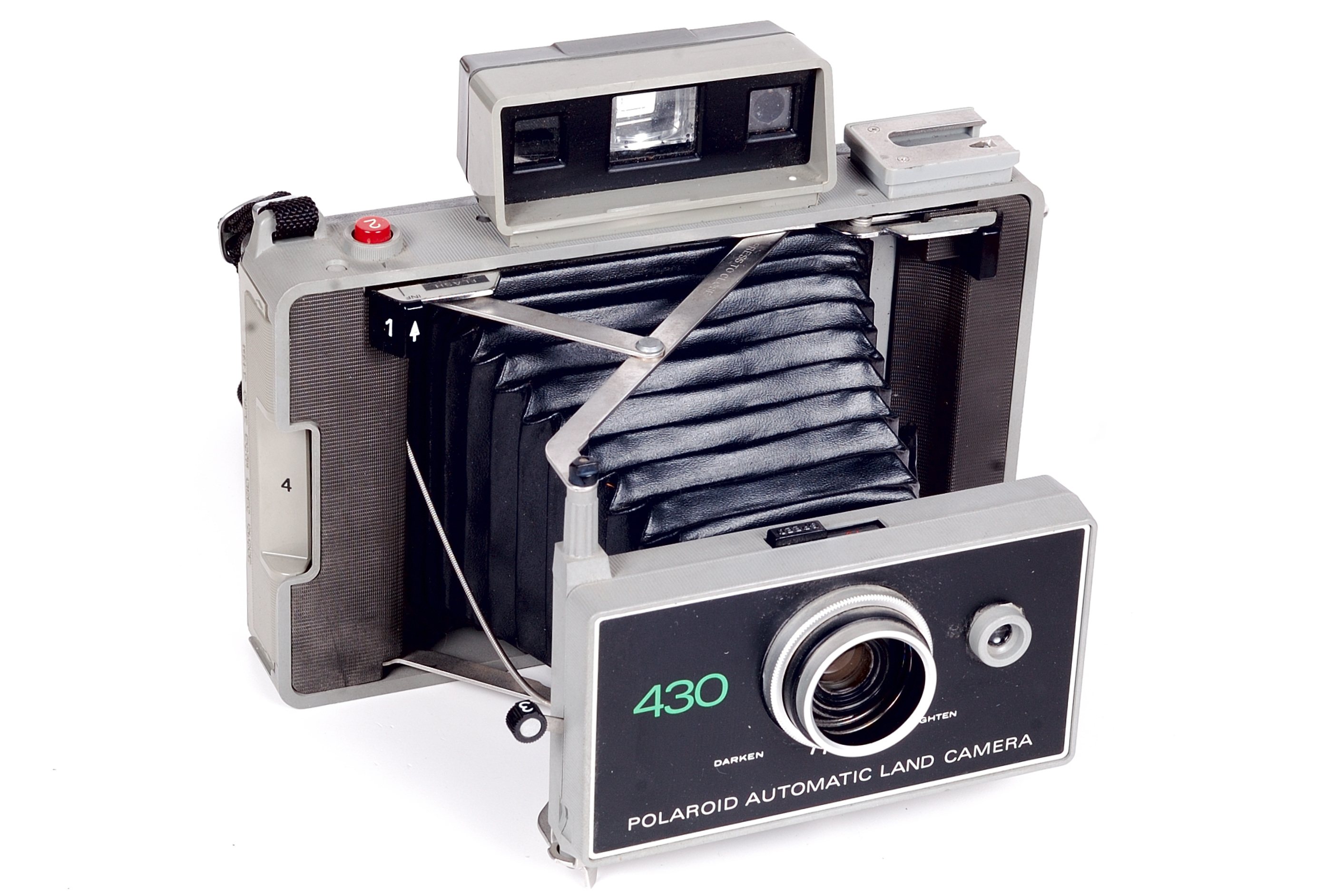 Polaroid-Kamera 430